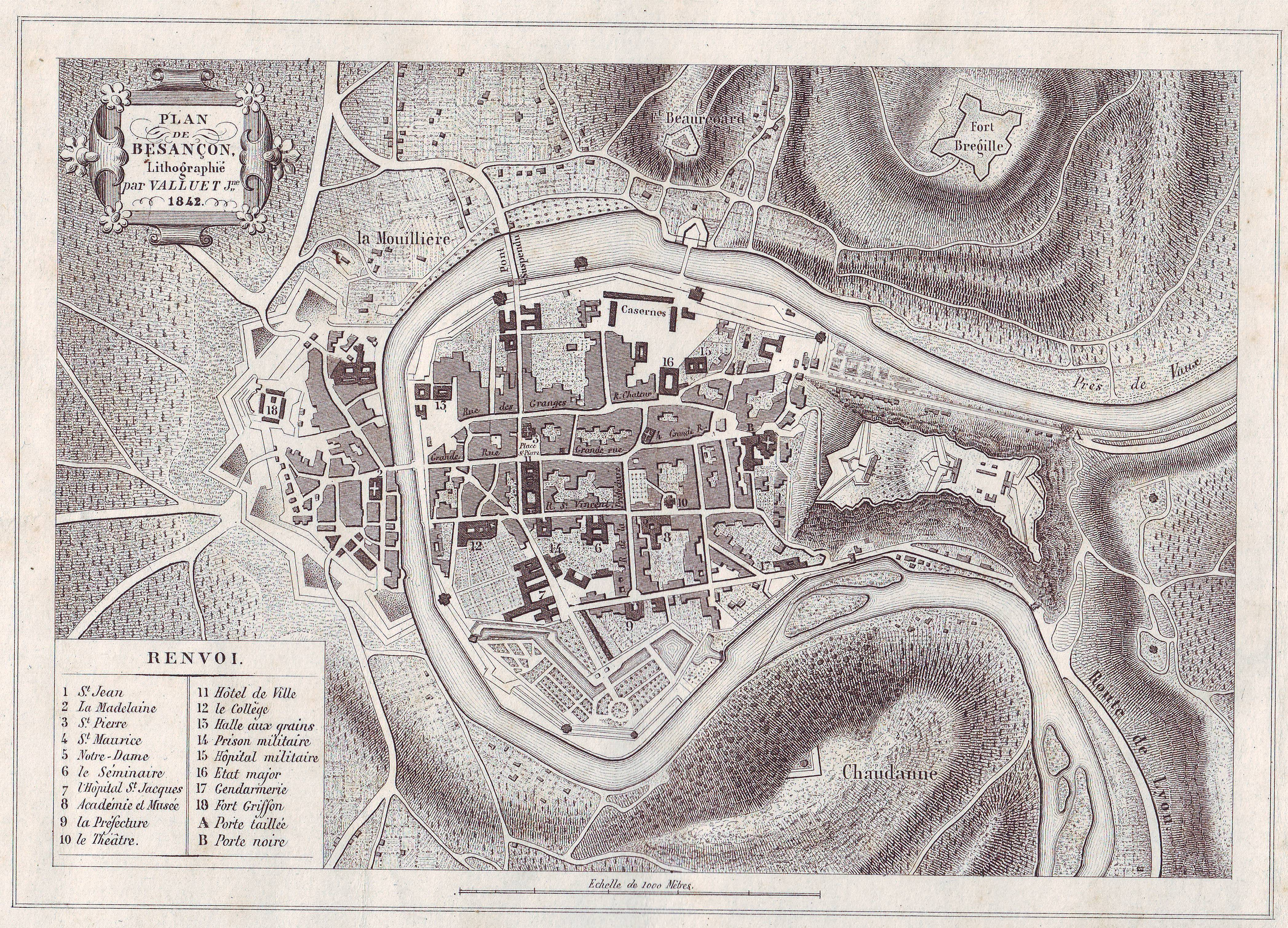 Ancien plan de la ville de Besançon, lithographié en 1842 par Valluet.